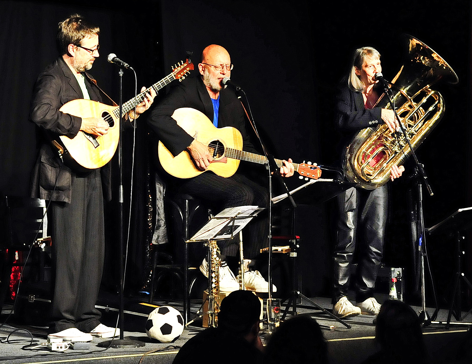 Liederjan bei einem Auftritt im Theater Drehleier in München